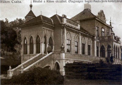 Villa Bogáti-Hajdú, Budapest District XVII, Hungary